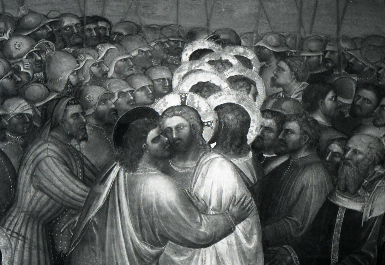 Servizio fotografico : Padova, 1965 / Paolo Monti. - Strisce: 2, Fotogrammi complessivi: 10 : Negativo b/n, gelatina bromuro d'argento/ pellicola ; 35 mm. - ((I fotogrammi hanno una doppia numerazione. - Sul portanegativi: Pentax ISS. - All'interno del portanegativi Monti specifica: "Affreschi del battistero di Giusto dei Menabuoi". - Occasione: Pubblicazione: "Emilio CECCHI, Natalino SAPEGNO (a cura di), Storia della Letteratura Italiana, 9 voll., Milano, Garzanti, 1966 e segg."